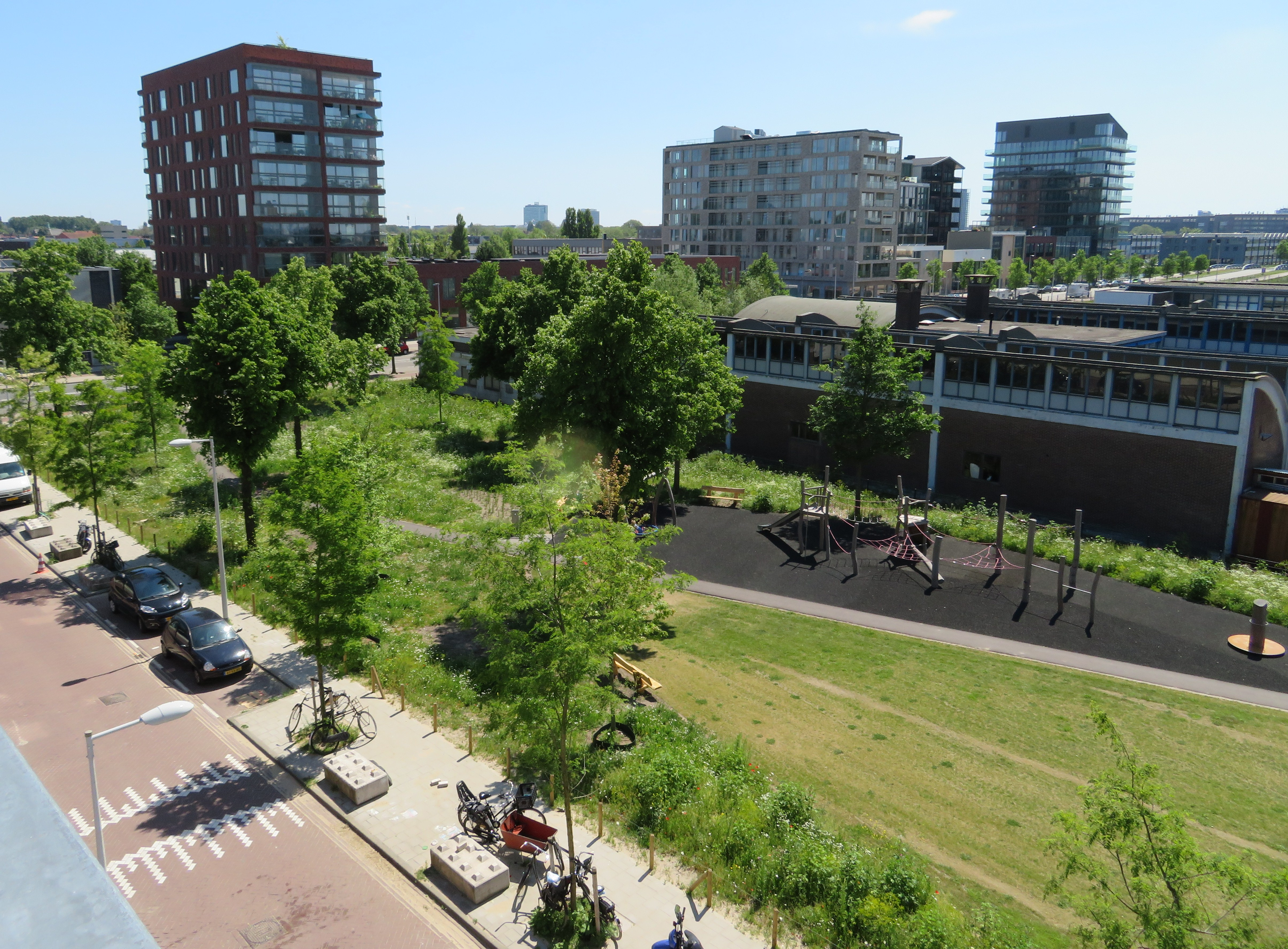 Papaverpark Amsterdam-Noord Buiksloterham